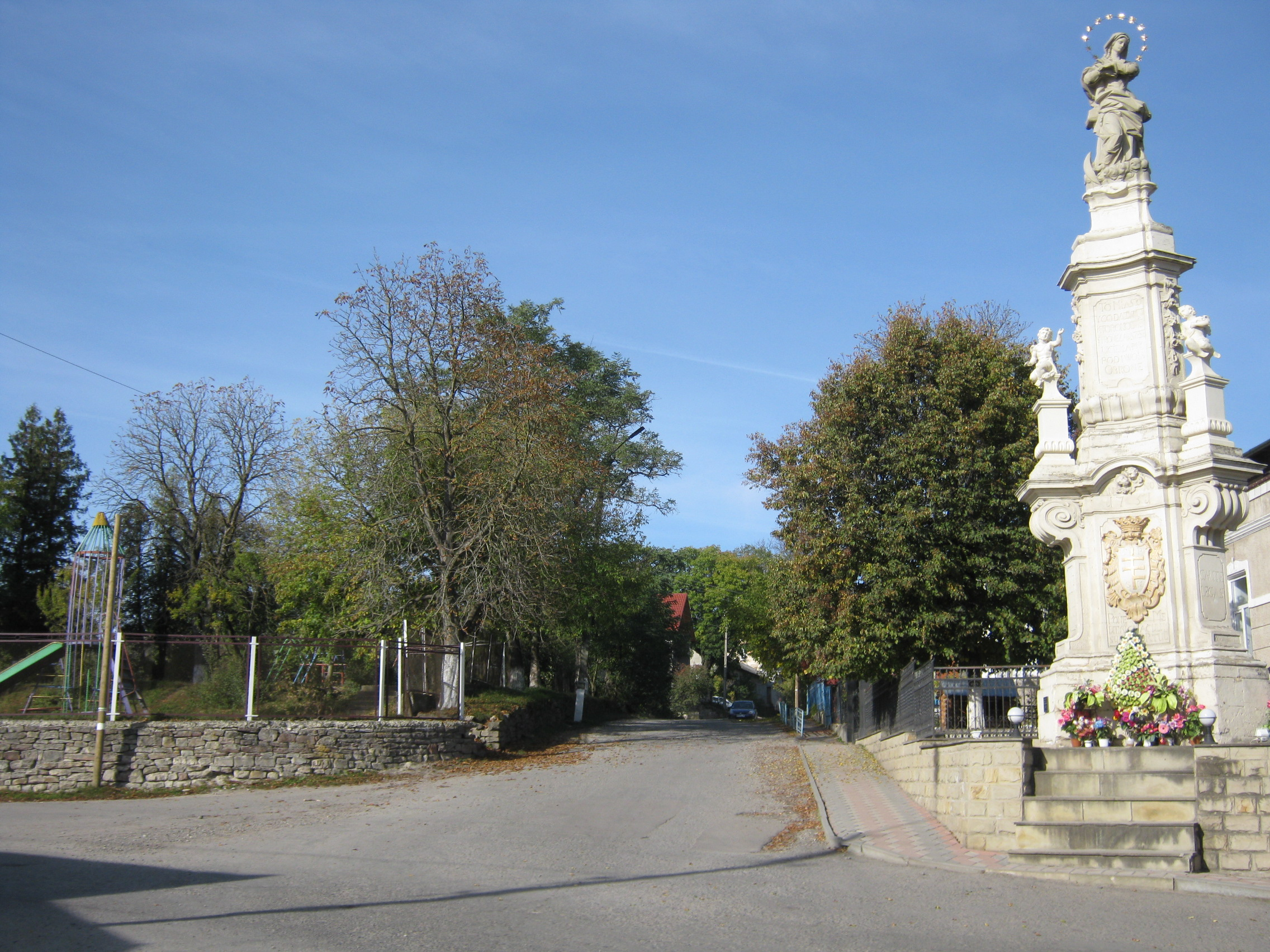 Перехрестя вулиць Стуса - Хмельницького. Зліва (на місці дитмайданчику) був храм Св. Трійці